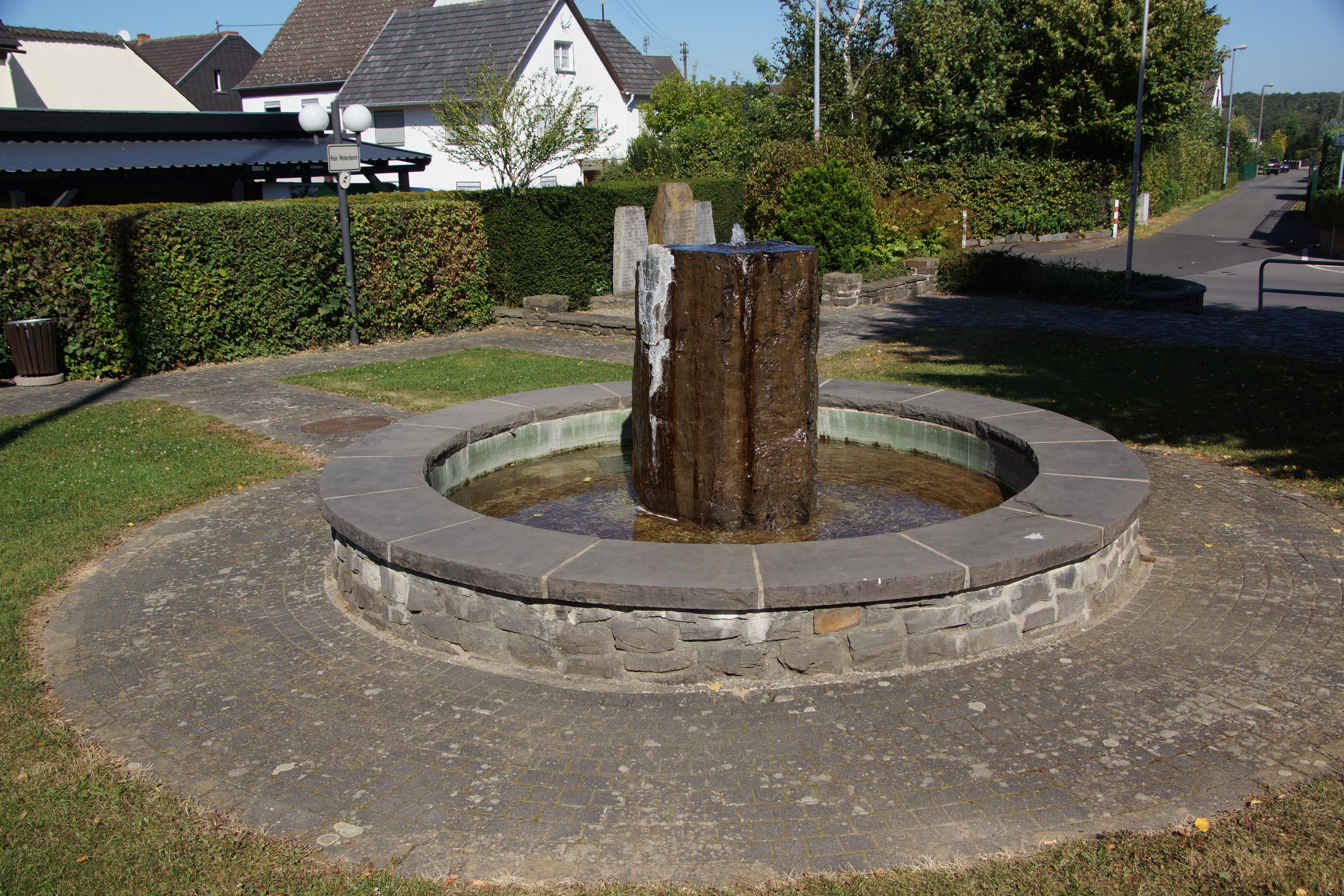 Brunnen in Berghausen, Königswinter